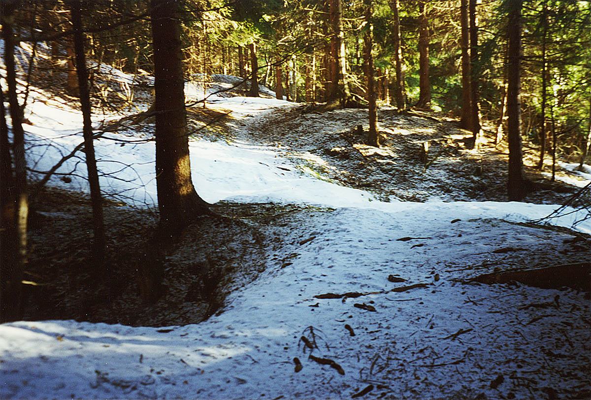 Schachtpinge am Sauerberg bei Suhl/Thüringer Wald.